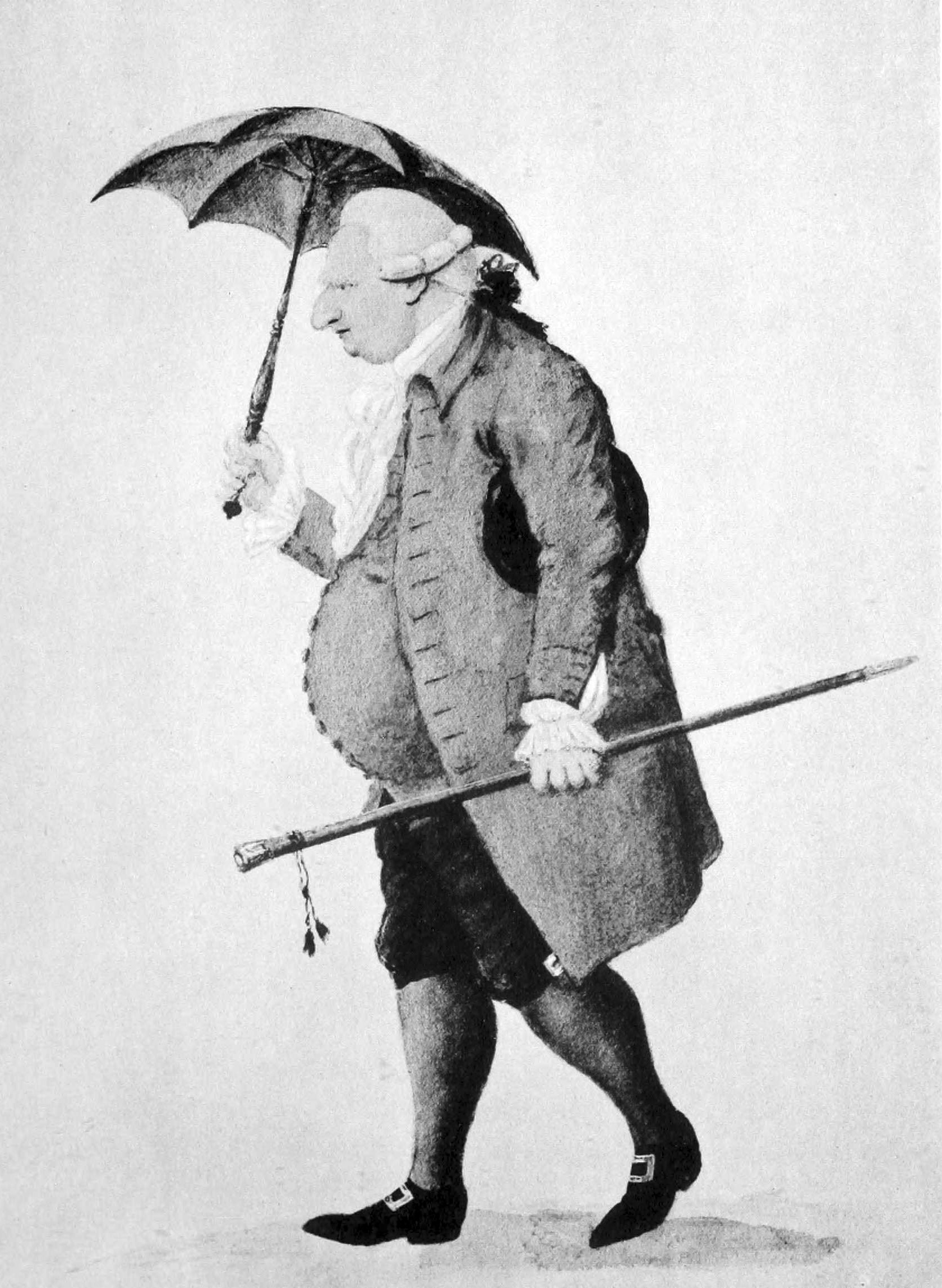 Johan Lorentz Odhelius (1737-1816). Gammal man, helfigur, profil t. h., gående, håller med högra handen en liten grön parasoll öfver sig, bär i venstra handen en lång brun käpp med gul knapp och svarta tofsar. Hvit piskperuk med en rad kanonlockar vid örat, svart nackrosett. Hvit lindad halsduk, hvitt krås, kråsmanschetter, mörkviolett väst knäppt nedtill, lång rock med nedliggande krage utan slag, stora ficklock, oknäppt, svarta kortbyxor med fyrkantiga knäspännen af stål, svarta strumpor, svarta skor med fyrkantiga stålspännen, den svarta runda hatten under venstra armen. Nere t. v. står: 469. På baksidan Assessor Odhelius 464/i404 L. K. Akvarell, 229x166 mm., af Anders Emanuel Muller. Nationalmuseum.